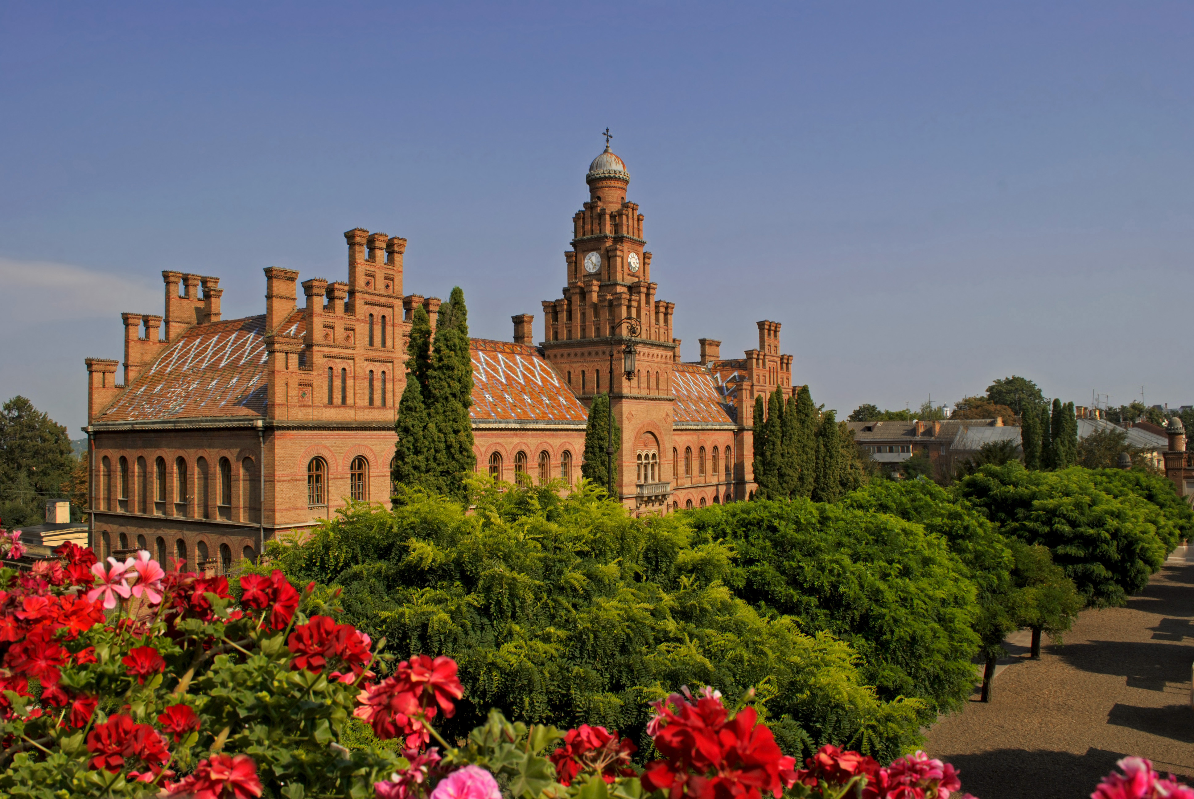 Будинок для приїжджих, Чернівці, вул. М. Коцюбинського, 2